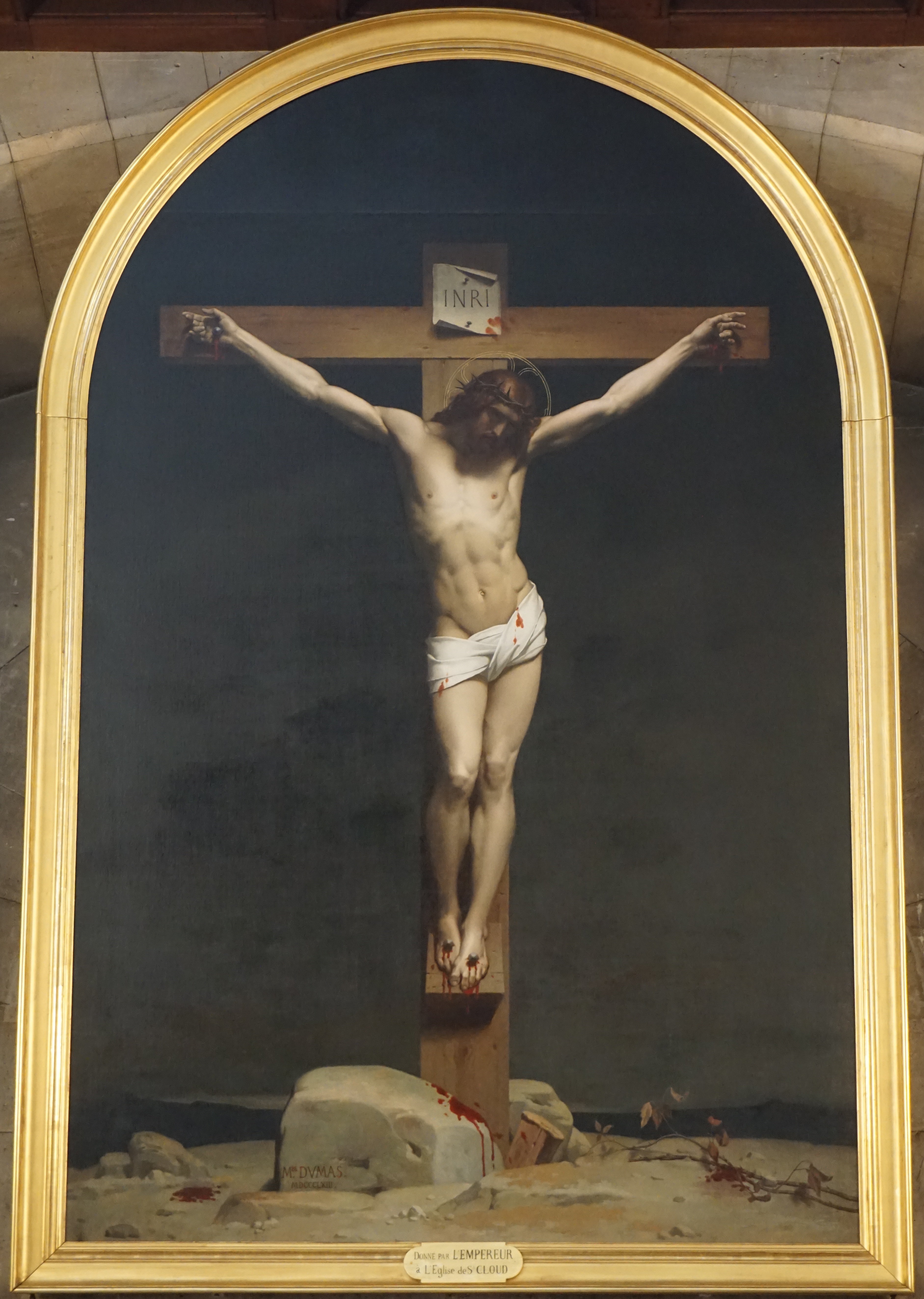 Huile sur toile - 374,5 x 242,5 cm, signé et daté 1863 Après restauration (2019) Saint-Cloud, église Saint-Clodoald Photo : Ludovic Roudet